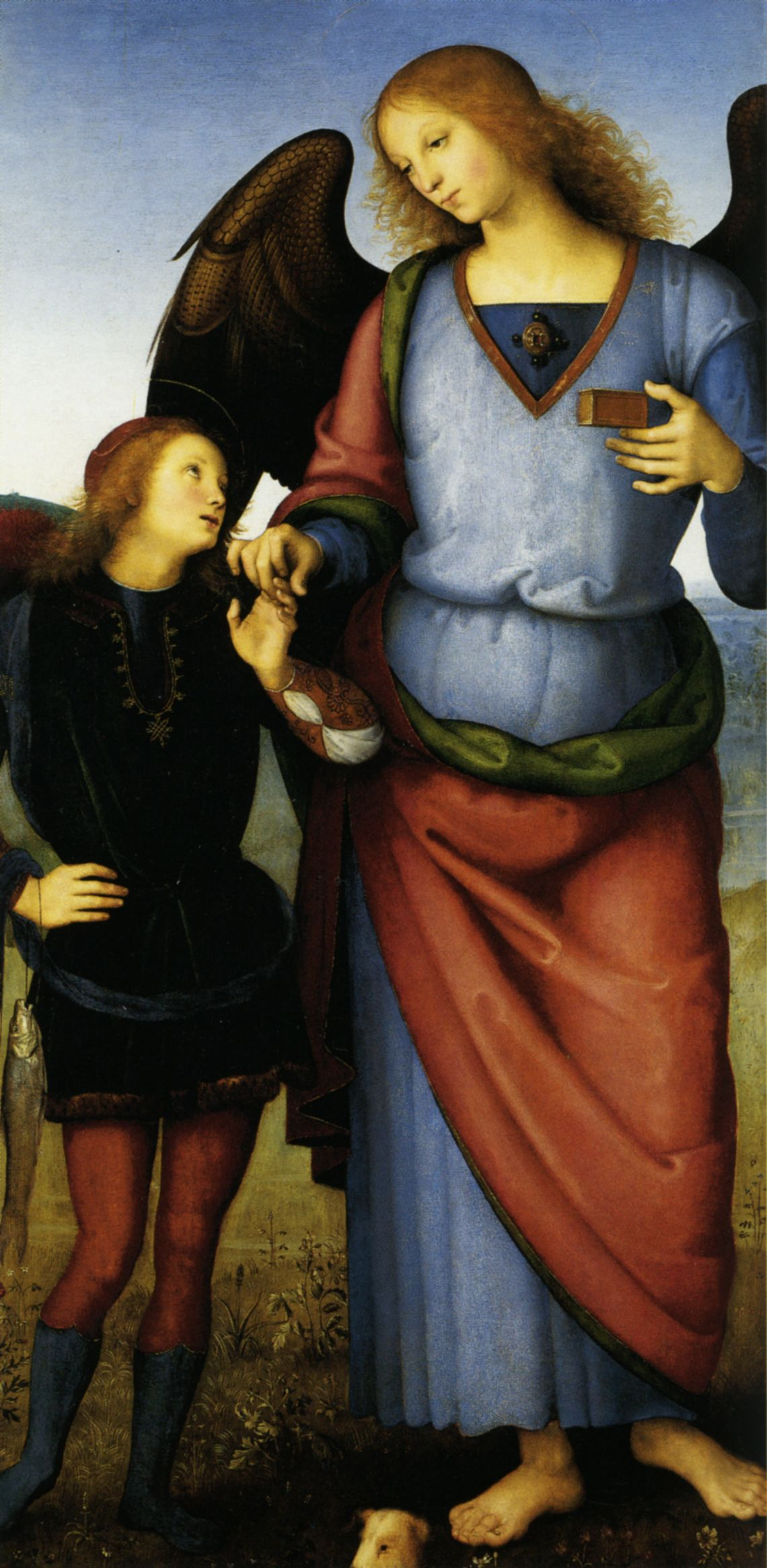 Pietro Perugino: Polittico della Certosa di Pavia (Arcangelo Raffaele con Tobia). Cat. no. 54 in Vittoria Garibaldi: Perugino. Catalogo completo. Octavo, Firenze 2000, ISBN 88-8030-091-1